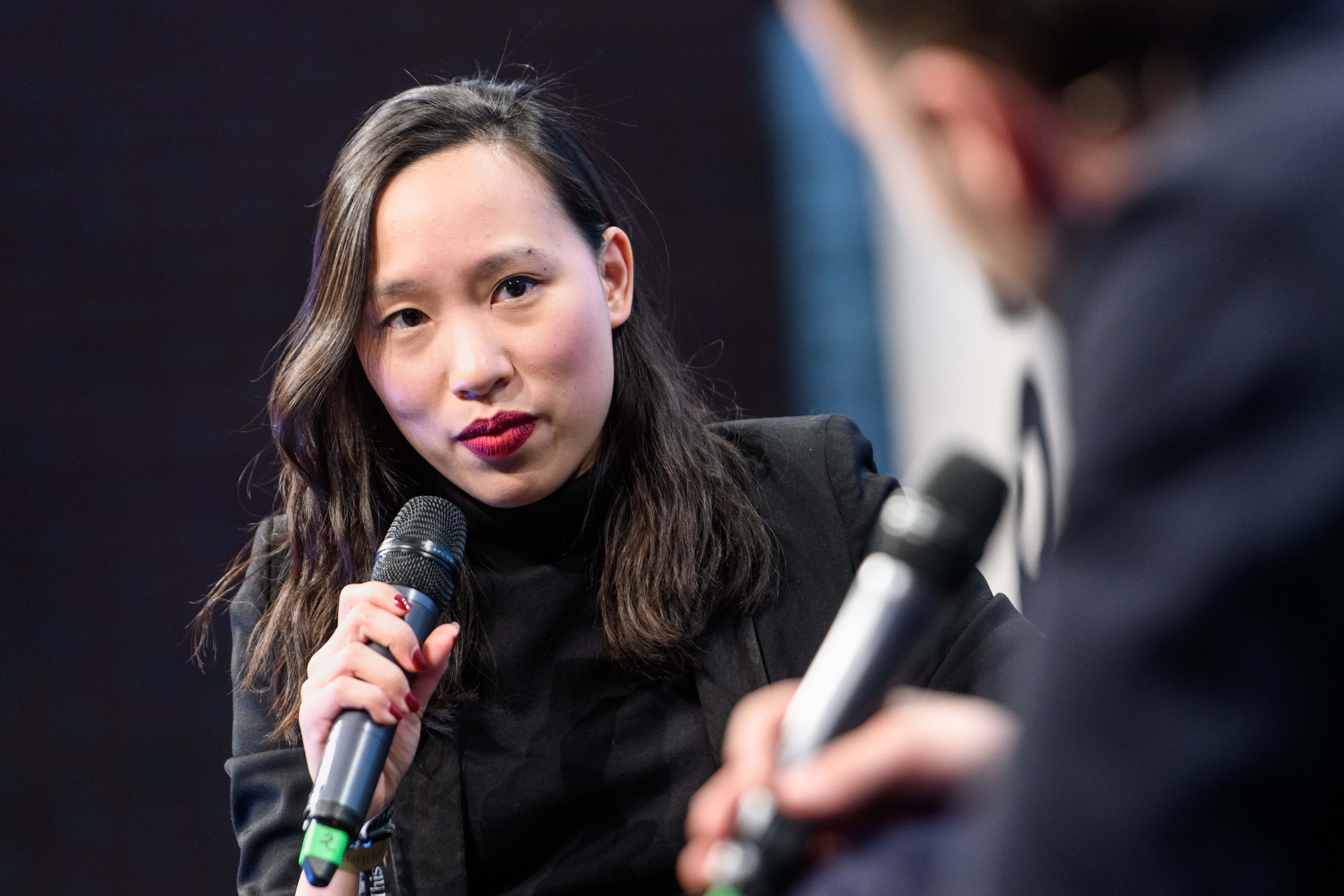 Discussion: Ist das gerade wirklich das Thema?! Relevanz in digitalen Zeiten Speaker: Georg Restle, Florian Klenk, Marietta Slomka, Vanessa Vu